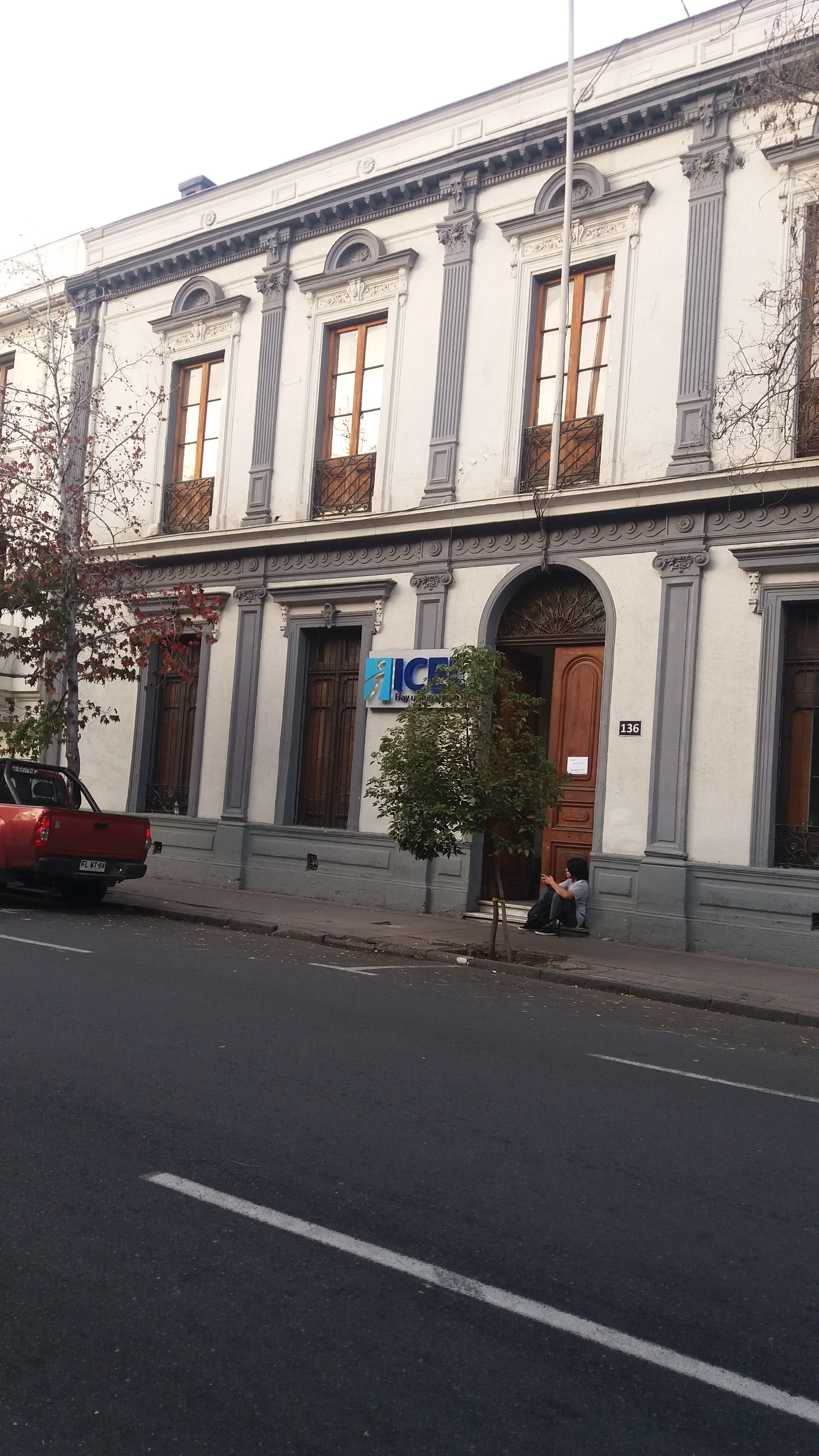 Fachada del Palacio Morandé Campino. Tomada 04/05